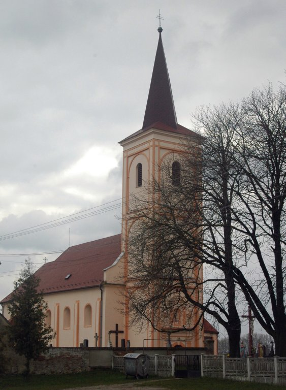 Kuklov, church (18 st)